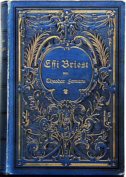 Theodor Fontane: Effi Briest. Original-Einband der ersten Buchausgabe 1896